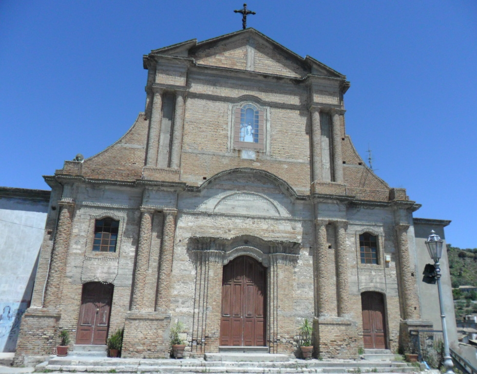 Gioiosa Jonica Chiesa Matrice o San Giovanni Battista